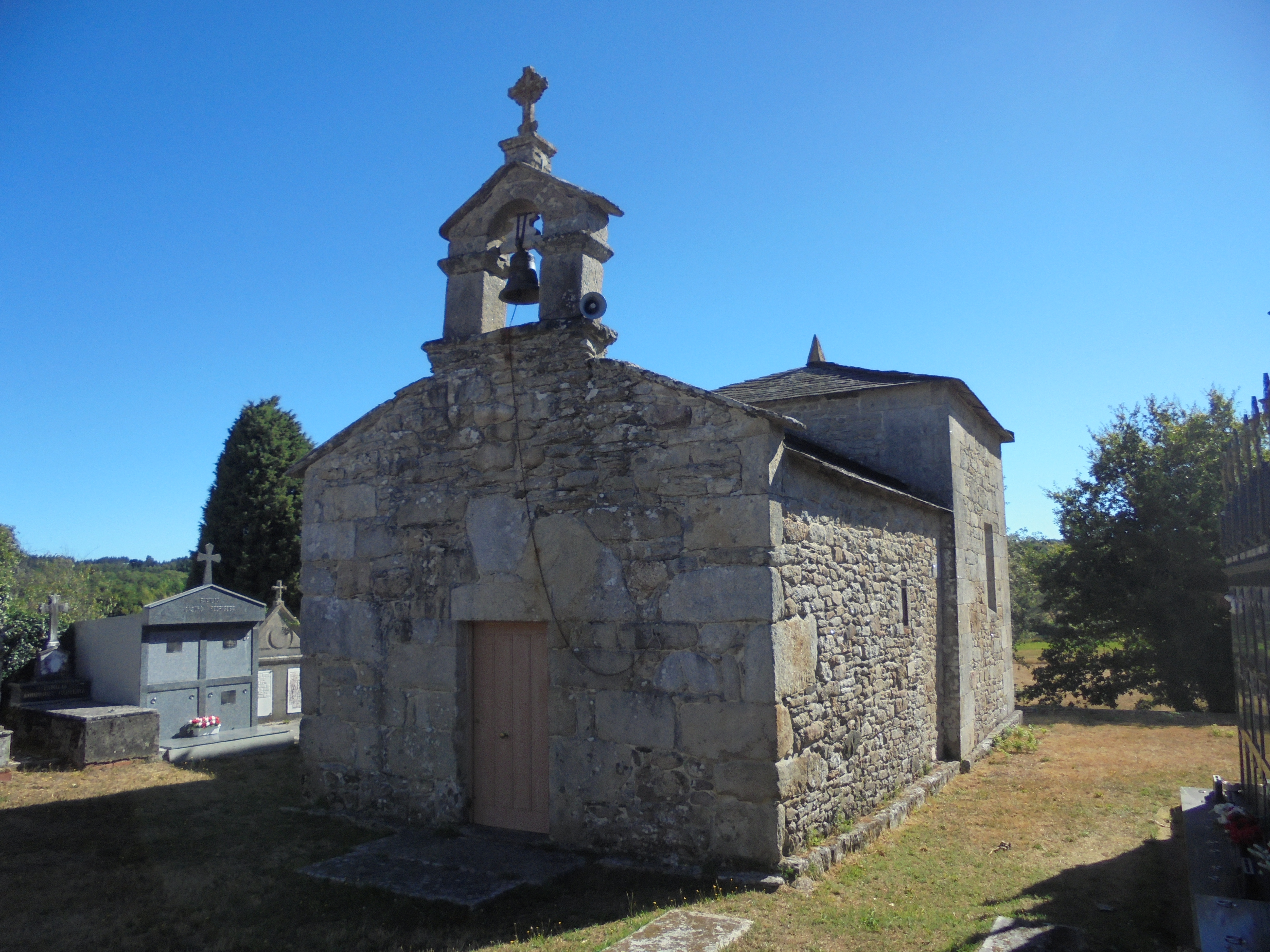 Igrexa parroquial de Santa Mariña de Torible ( Lugo)